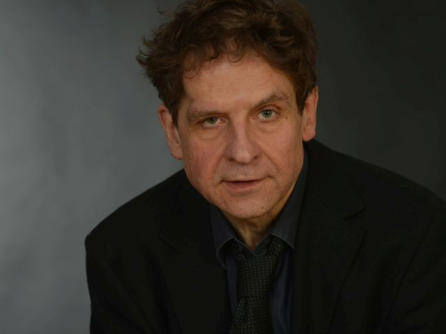 Portrait-Foto